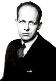 Pierre Drieu la Rochelle en 1938. Portrait anonyme.